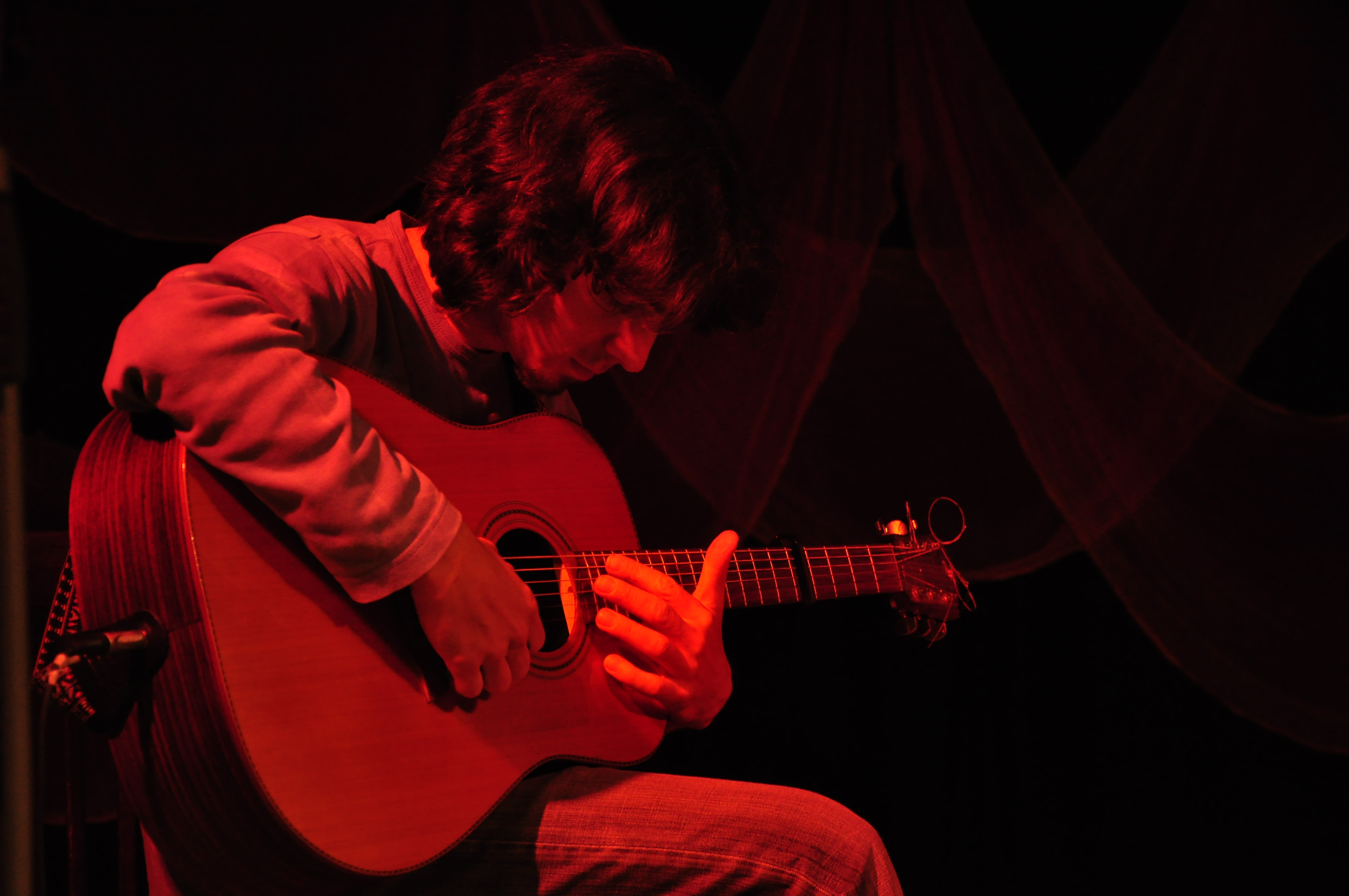 Petr Ovsenák (Nestíháme) in Máme na to?! music festival, Chotěboř, Czech Republic